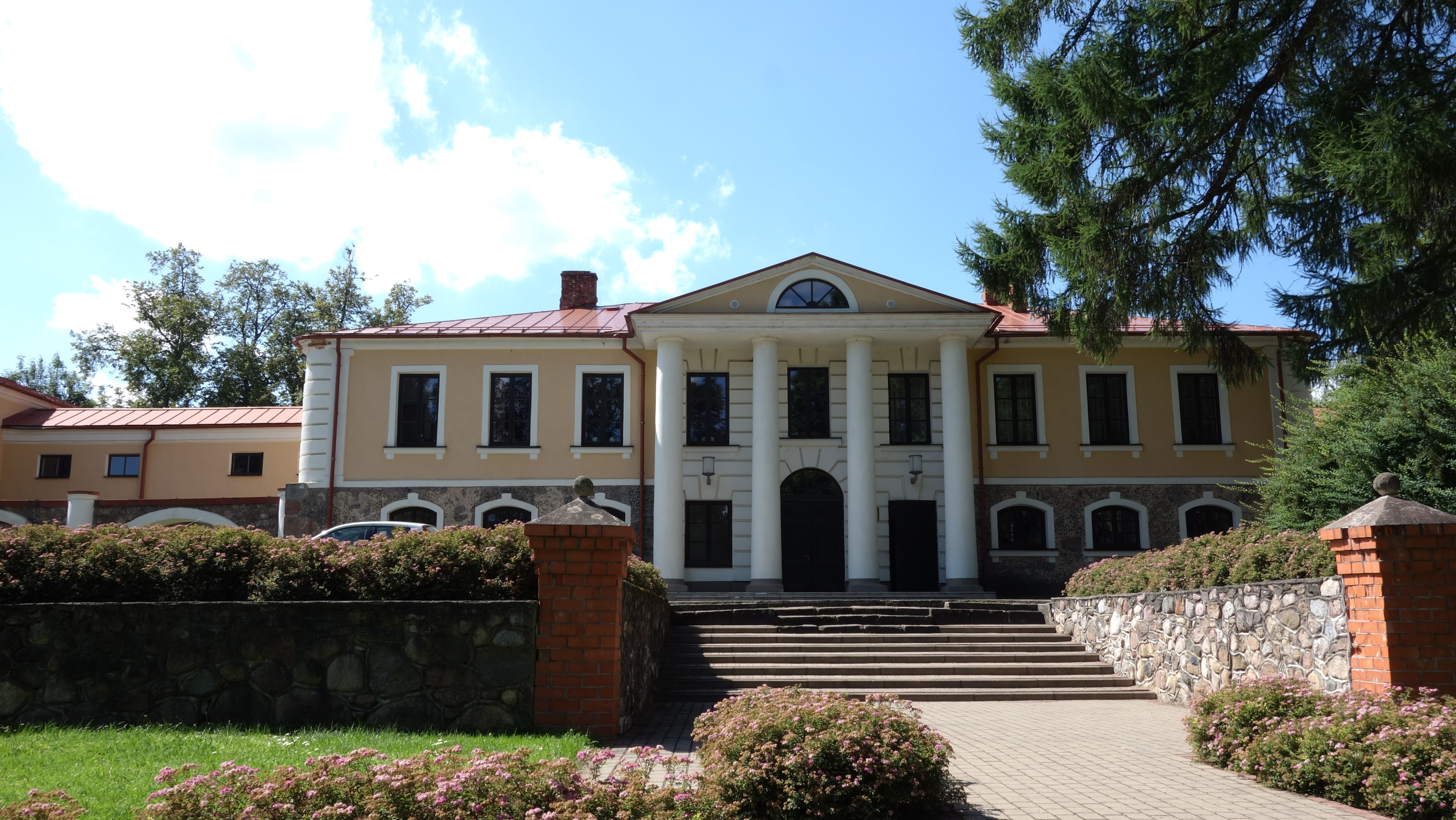 Vecpiebalga mõisa peahoone fassaad 2015. aastal.